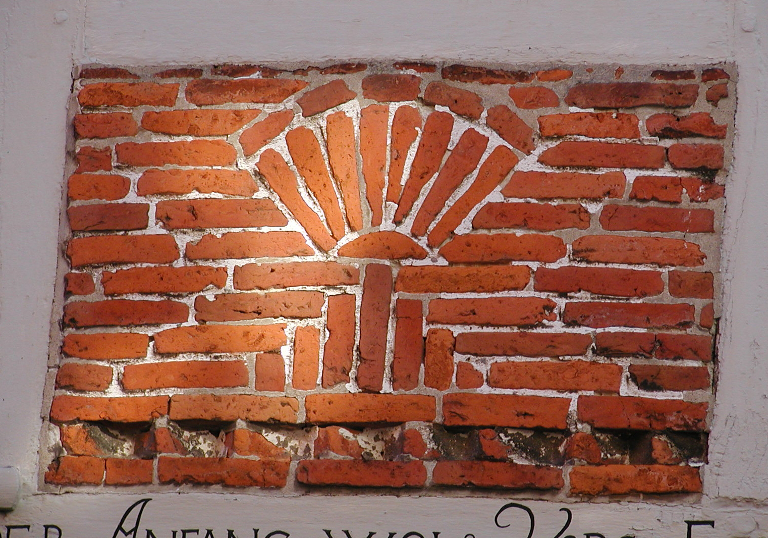 In einigen alten Häuseren sind diese "Hexenbesen" gemauert